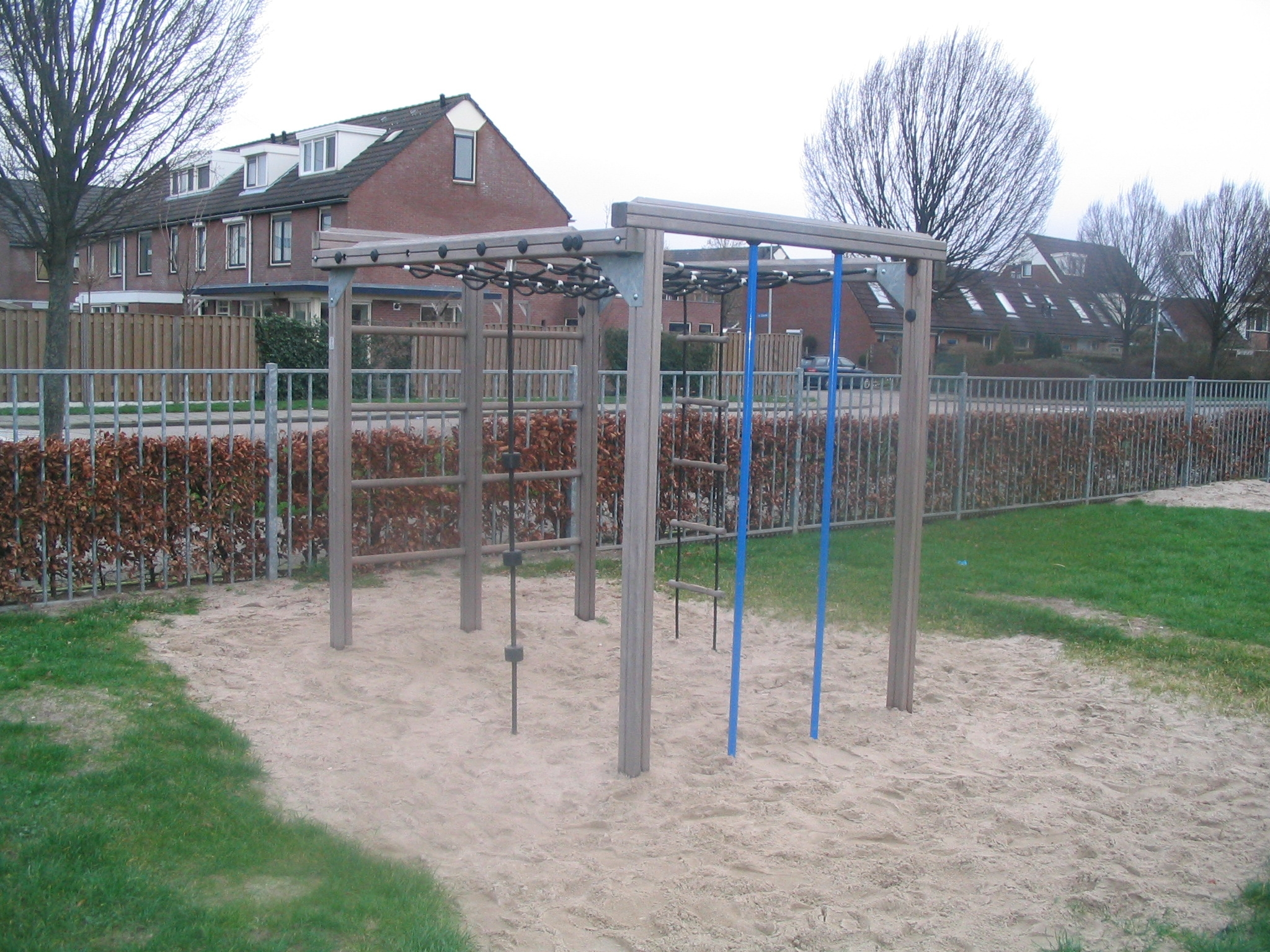 Een klimrek in Elst